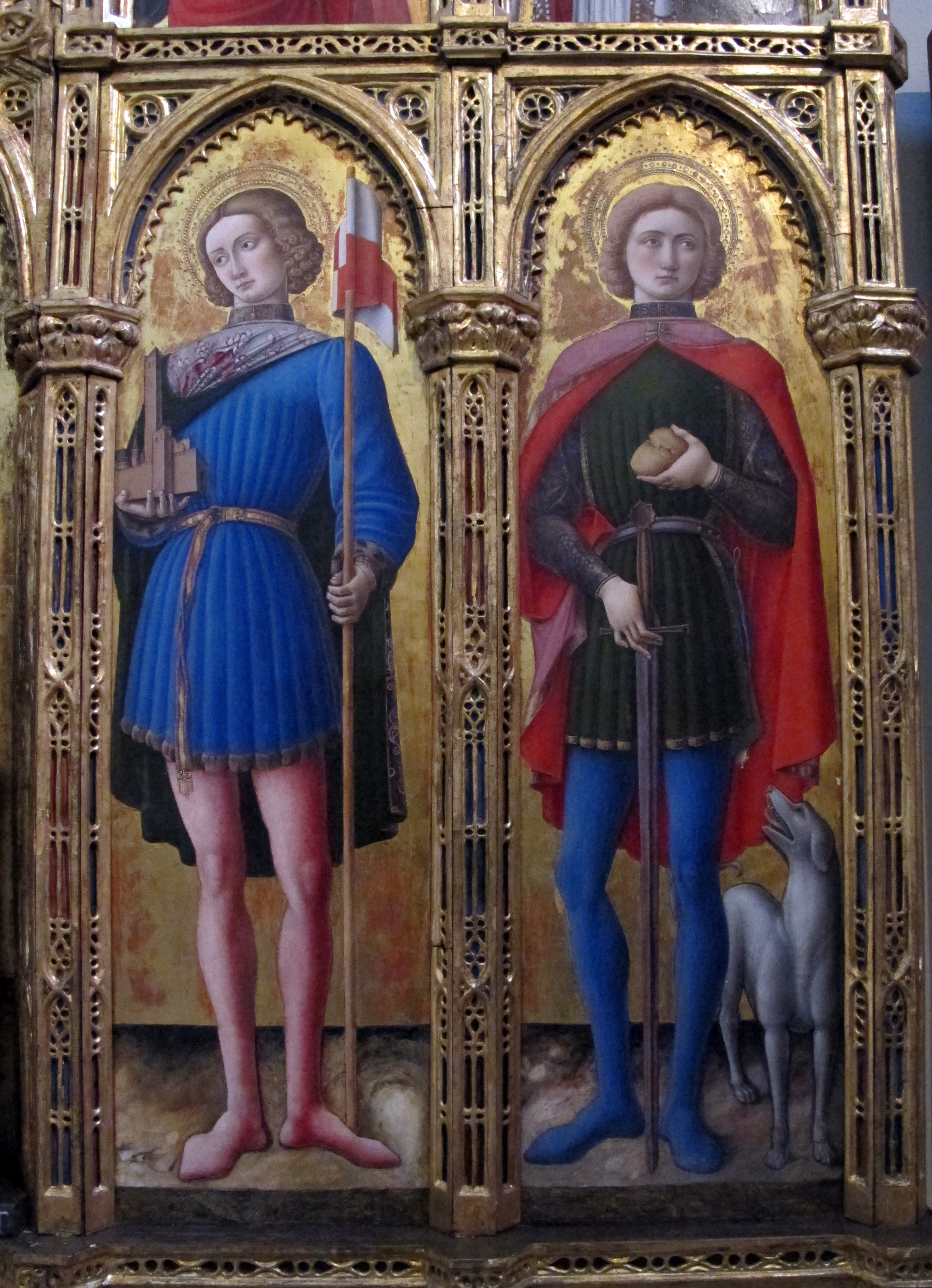 polittico coi ss Antonio Abate, Sebastiano, Cristoforo, Venanzio e Roccodetail